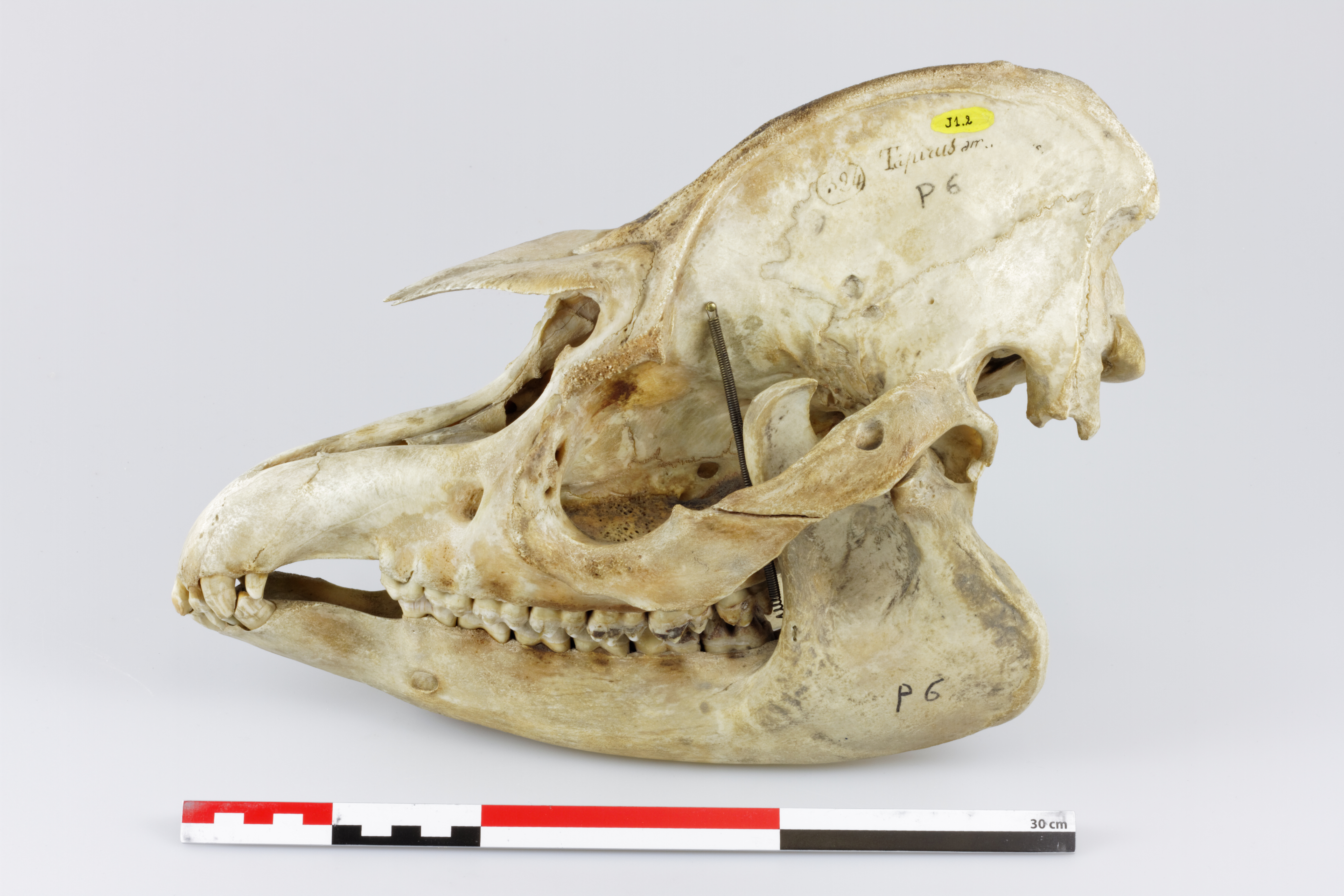 collection de l'Université Pierre-et-Marie-Curie à Paris.